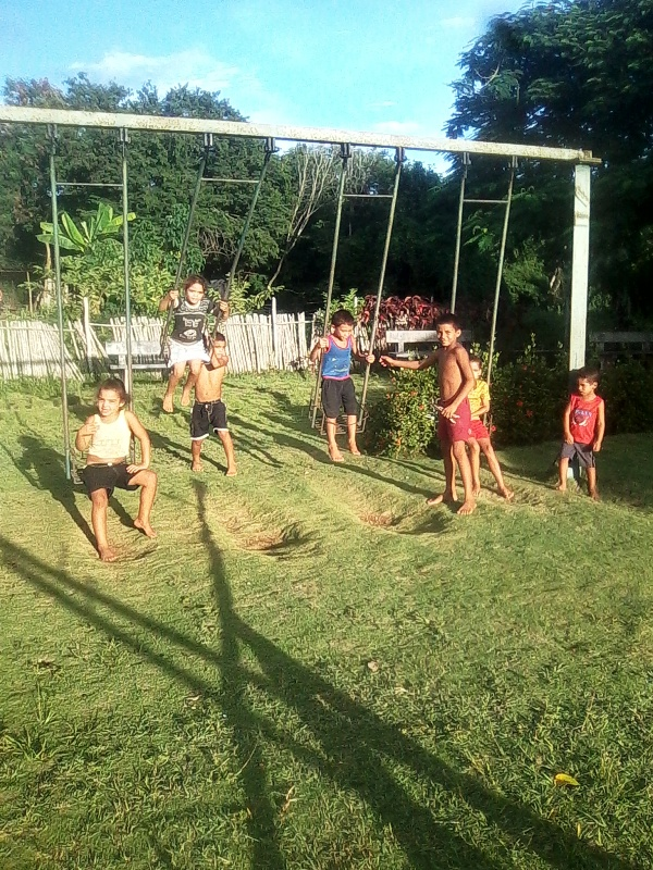 Micro-parque de juegos en Alegría de Pio